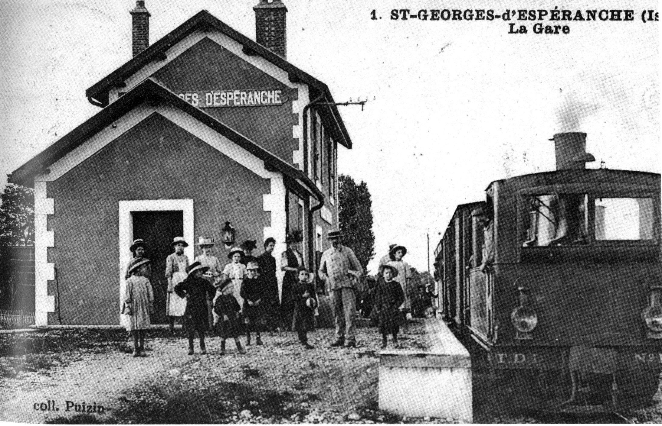 Saint-Georges-d'Espéranche, la gare, vers 1925